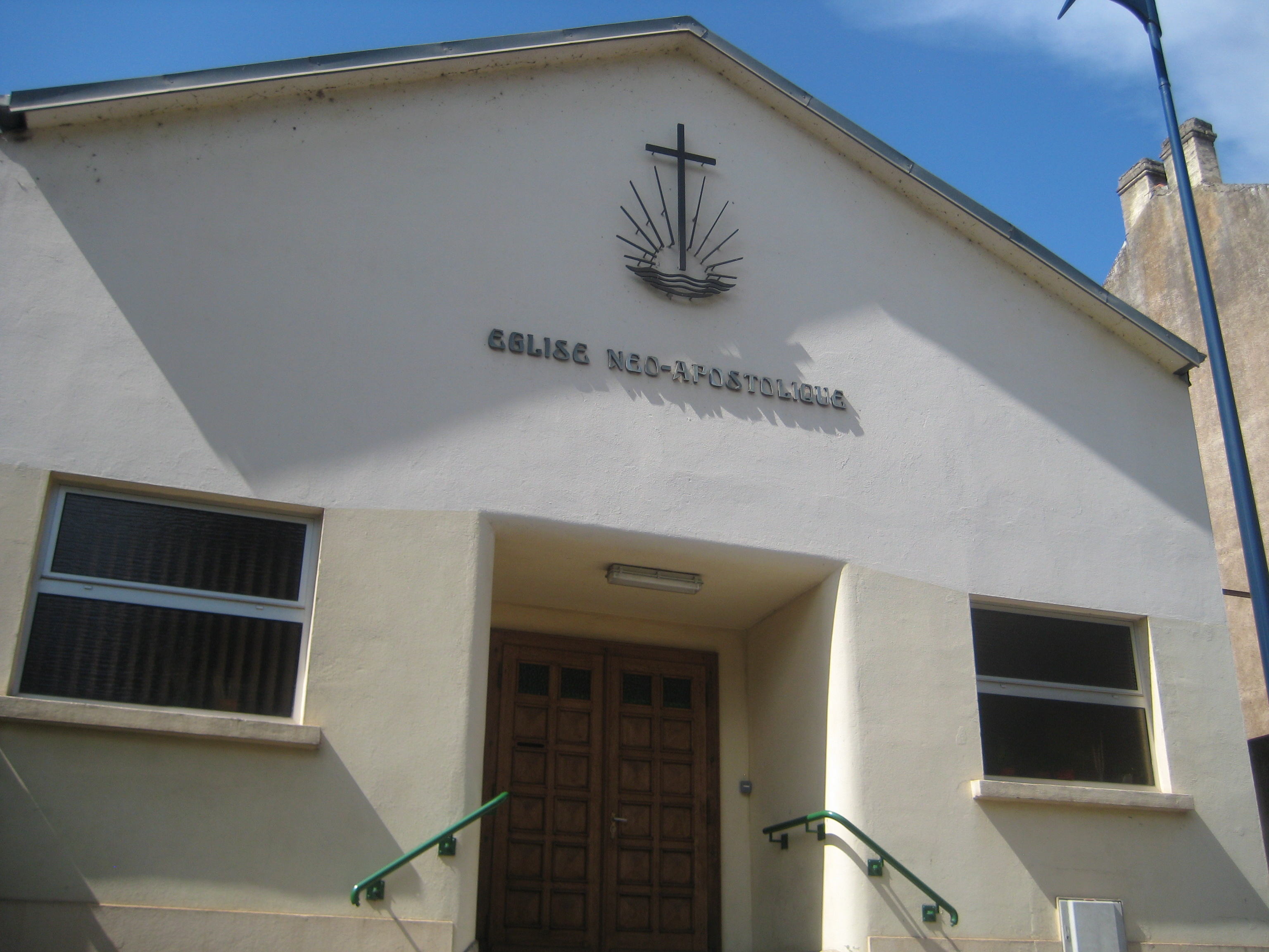 Description Église néo-apostolique Rombas Date11 August 2011Sourcemon appareil photoAuthorAimelaimePermission(Reusing this file) Église néo-apostolique Rombas